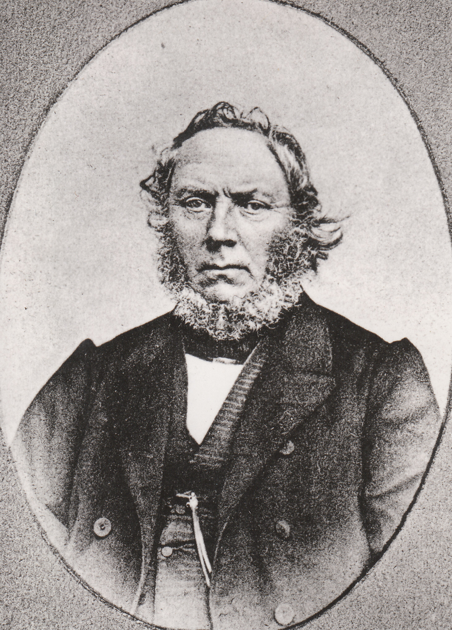 Format: Fotopositiv Dato / Date: Ukjent Fotograf / Photographer: Ukjent Sted / Place: Trondheim Eier / Owner Institution: Trondheim byarkiv, The Municipal Archives of Trondheim Arkivreferanse / Archive reference: Tor.H41.B40.F2946 Merknad: Baksiden av bildet har påskrevet henvisning til boken Trondheim Bys Historie, bind 3, side 454. Ole Andreas Krogness var bankdirektør og kjøpmann og var født i Rissa. Faren var tømmermann Jakob Nielsen Krogness og moren het Karen Olsdatter. Ole A. Krogness flyttet som ungdom til Trondheim og begynte i handelslære hos kjøpmann Arnt Solem på Bakklandet. Krogness ble gift med enken Anne Bergithe Dahl og overtok forretningen etter hennes tidligere mann. Han var en aktiv mann i byens økonomiske liv, blant annet styremedlem i Trondhjems Sparebank fra 1843 til 1869, medstifter av Trolla Brug og Spareskillingsbanken - og var dessuten medeier i Norges førstedampskip «Nidelven». Krogness hadde også flere offentlige verv; han satt i bystyretfra 1840-årene og utover, var stortingsmann i 1848, gjenvalgt i1851, 1857 og 1859-60, og var styremedlem i Norges Bank fra 1846til 1869. Han hadde også sterk tilknytning til Trondhjems Arbeiderforening og ble en av de første æresmedlemmer der. Da Trondhjems Tekniske Læreanstalt ble åpnet i 1870, var Ole A. Krogness død. Men han hadde gjort en stor innsats for å skaffe den nødvendige kapital for at skolen skulle komme i drift. Han var også lenge forlikskommissær i Trondheim - det vil si leder for de tre valgte menn som utgjorde forliksrådet. Byens barneasyl var han også opptatt av i mange år. Ole Andreas Krogness eide eiendommen Sommerro (opprinnelig Nidareid) - og Nidarø gård der han døde i 1869. Kilde: Adressa.